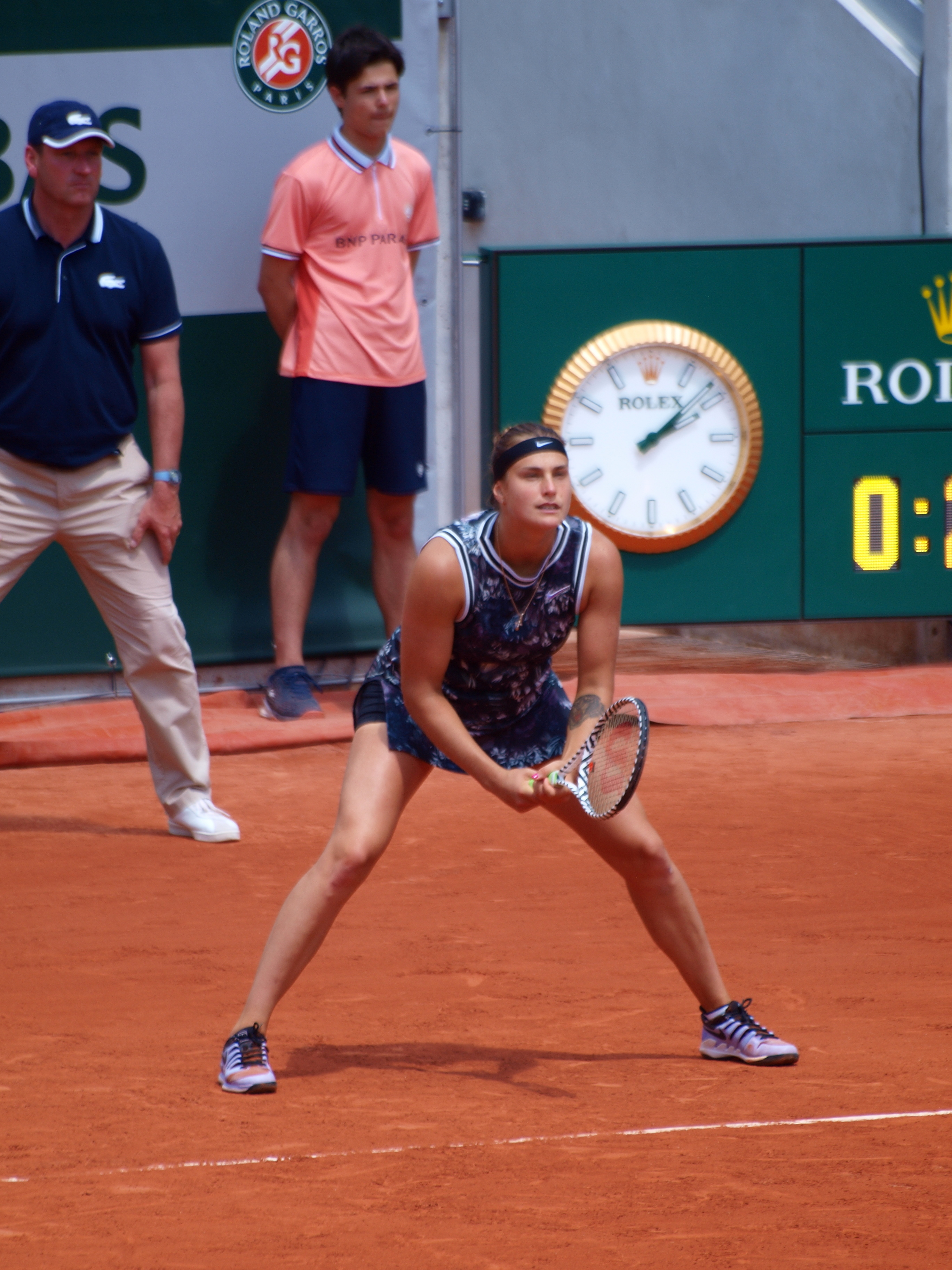 Internationaux de France de Tennis 2019, au stade Roland Garros de Paris (France), sur le nouveau court Simonne-Mathieu : Double dames entre E. Mertens & A. Sabalenka d'une part et L. Kichenok & J. Ostapenko d'autre part, le jeudi 6 juin 2019